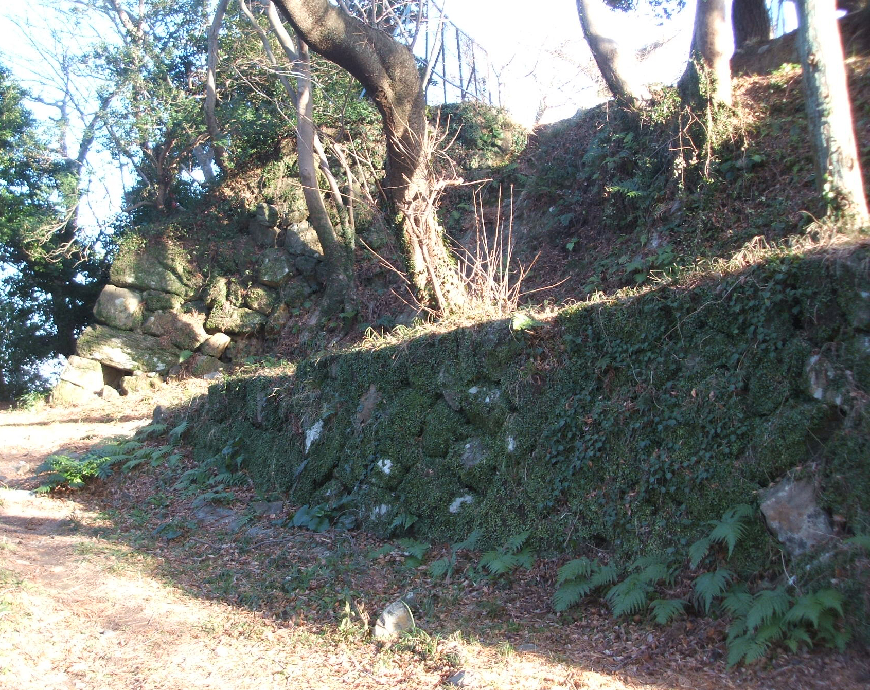 鳥羽城石垣